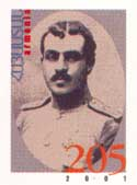 no original description